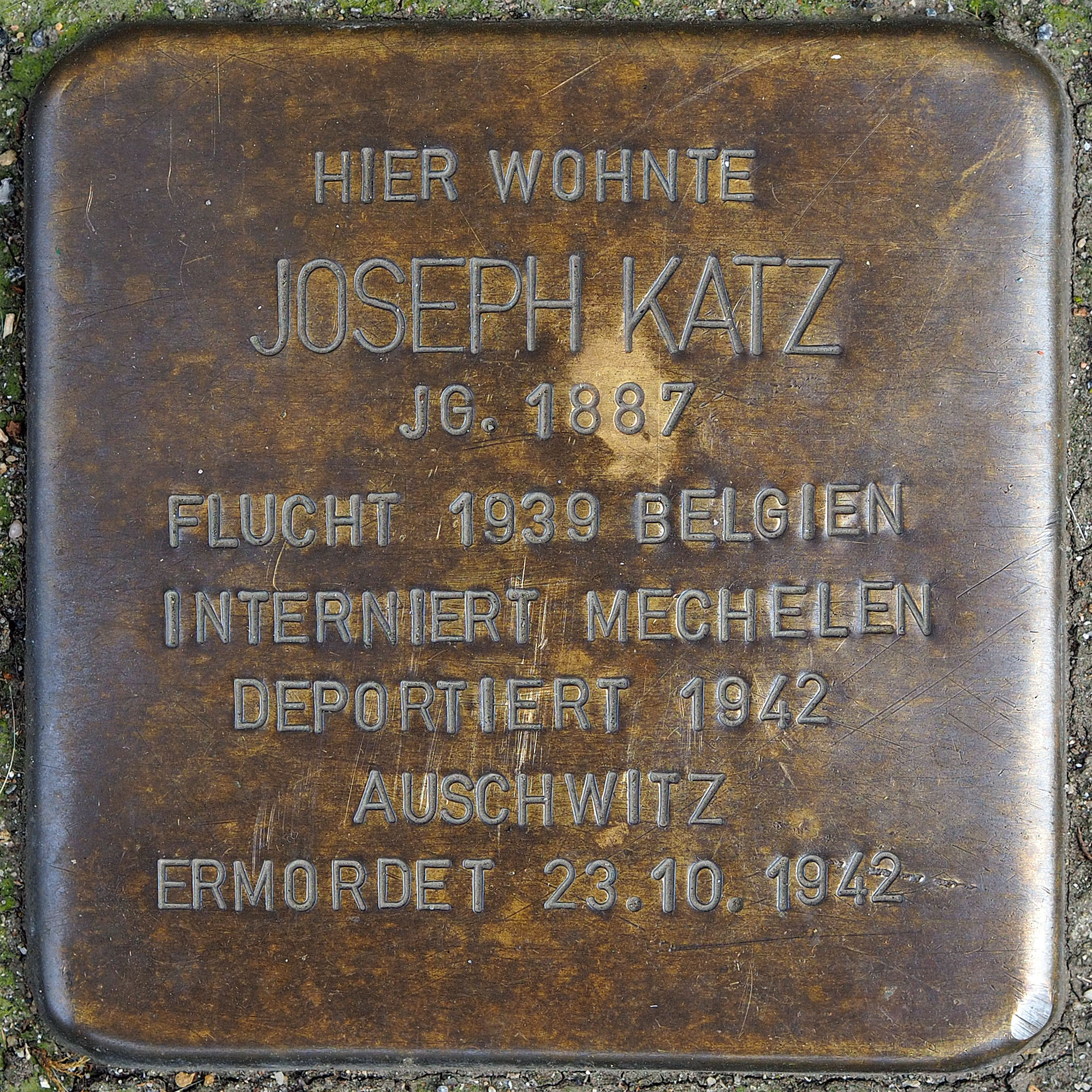 Stolpersteine GV: Katz, Joseph